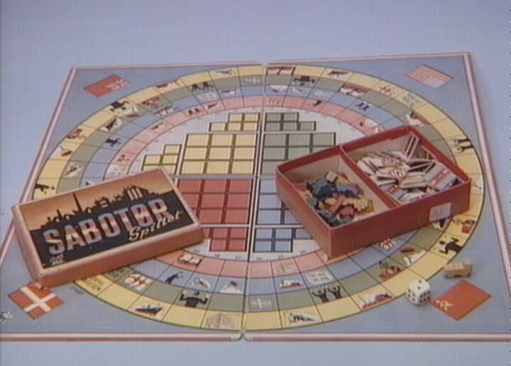 Sabotør-spil udgivet umiddelbart efter krigen. (mere på )